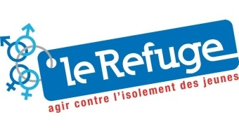 Logo de l'association Nationale Le Refuge